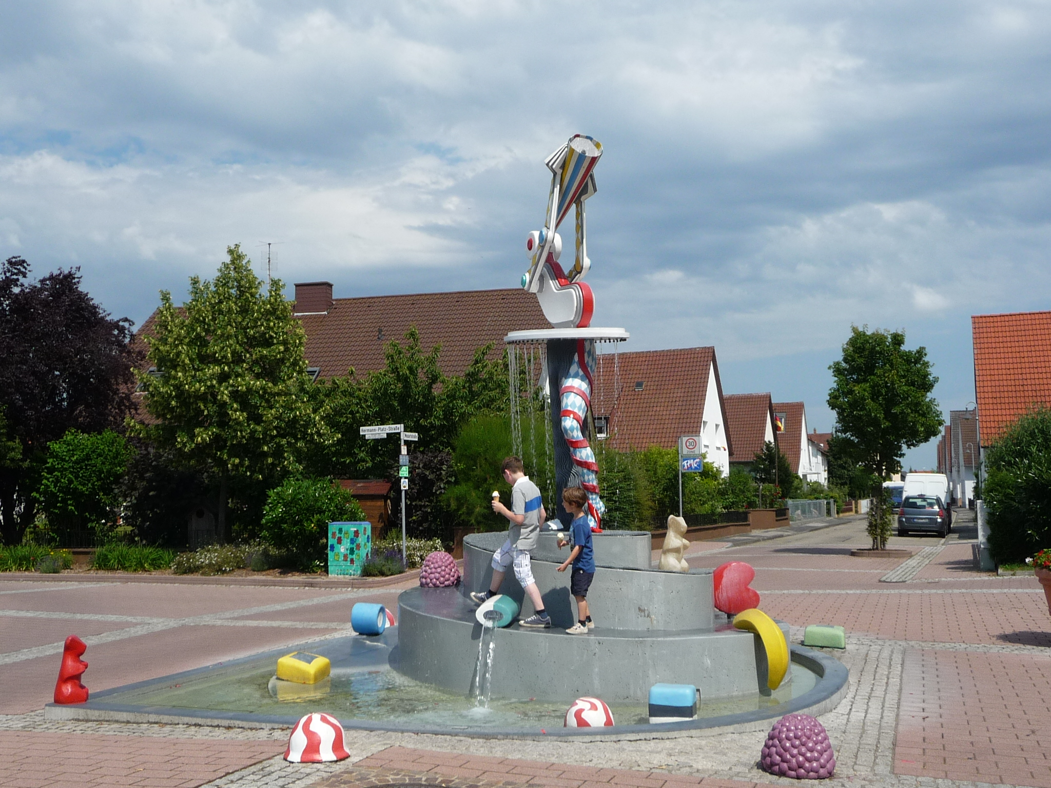 Offenbach an der Queich ist eine Ortsgemeinde im Landkreis Südliche Weinstraße in Rheinland-Pfalz.